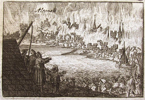 Der Brand Altonas 1713 (sog. "Schwedenbrand") Kupferstich 5,5×8,2 cm.